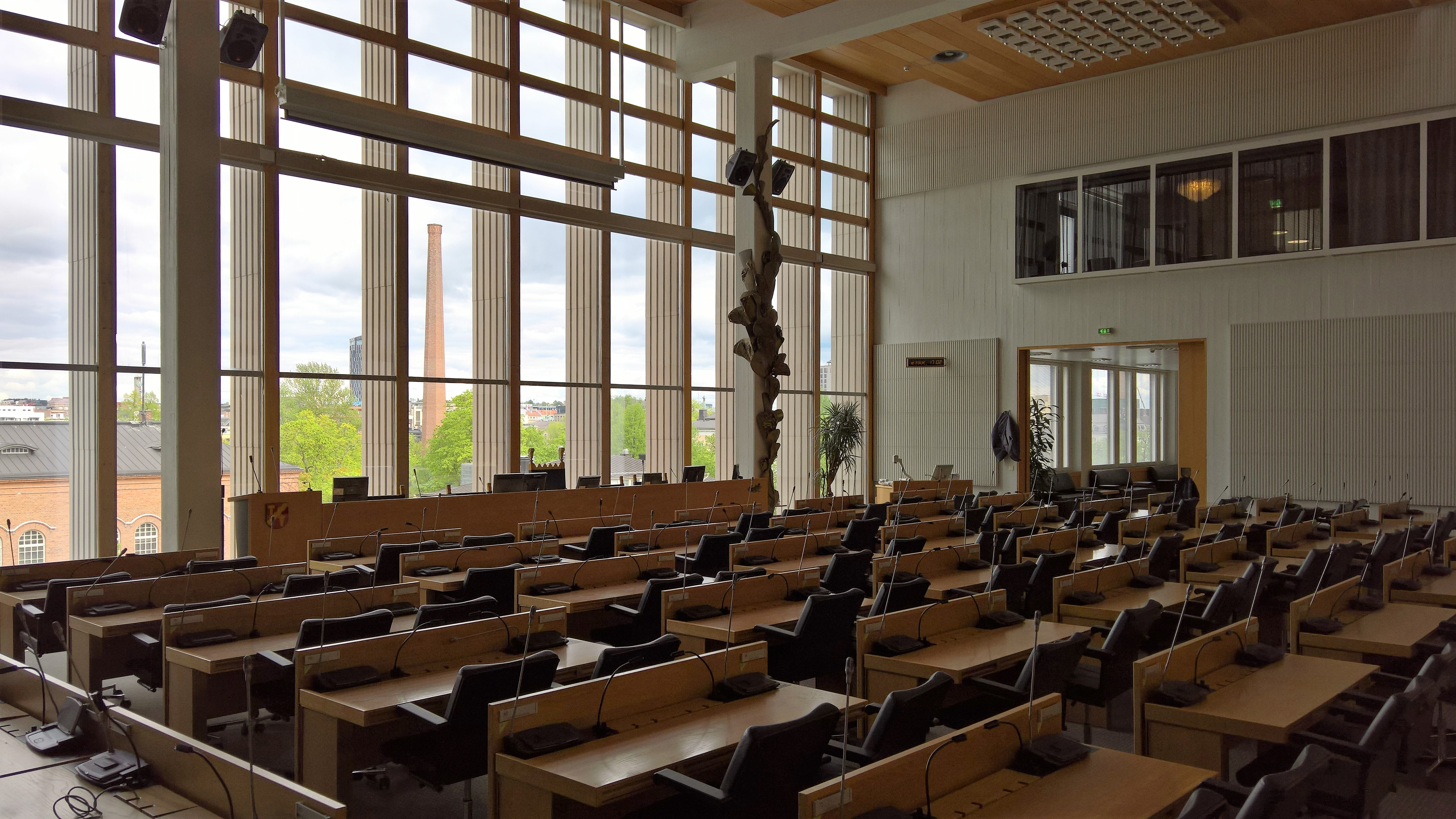 Tampereen kaupunginvaltuuston istuntosali keskusvirastotalolla, kuvattuna salin alimmaisen kerroksen takaosasta.